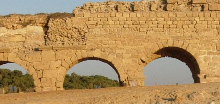 חלק מאמת מים בקיסריה.